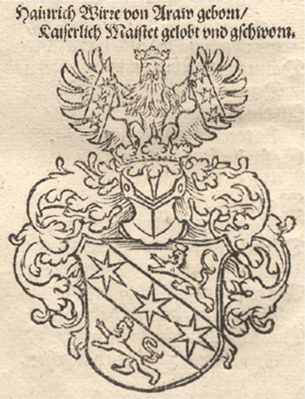 Wappen von Heinrich Wirri